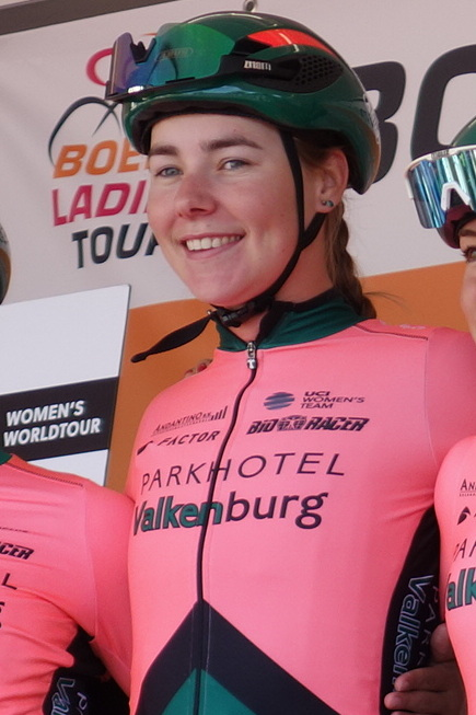 Femke Markus (Parkhotel Valkenburg) bij de start van de eerste etappe van Stramproy naar Weert in de Boels Ladies Tour 2019